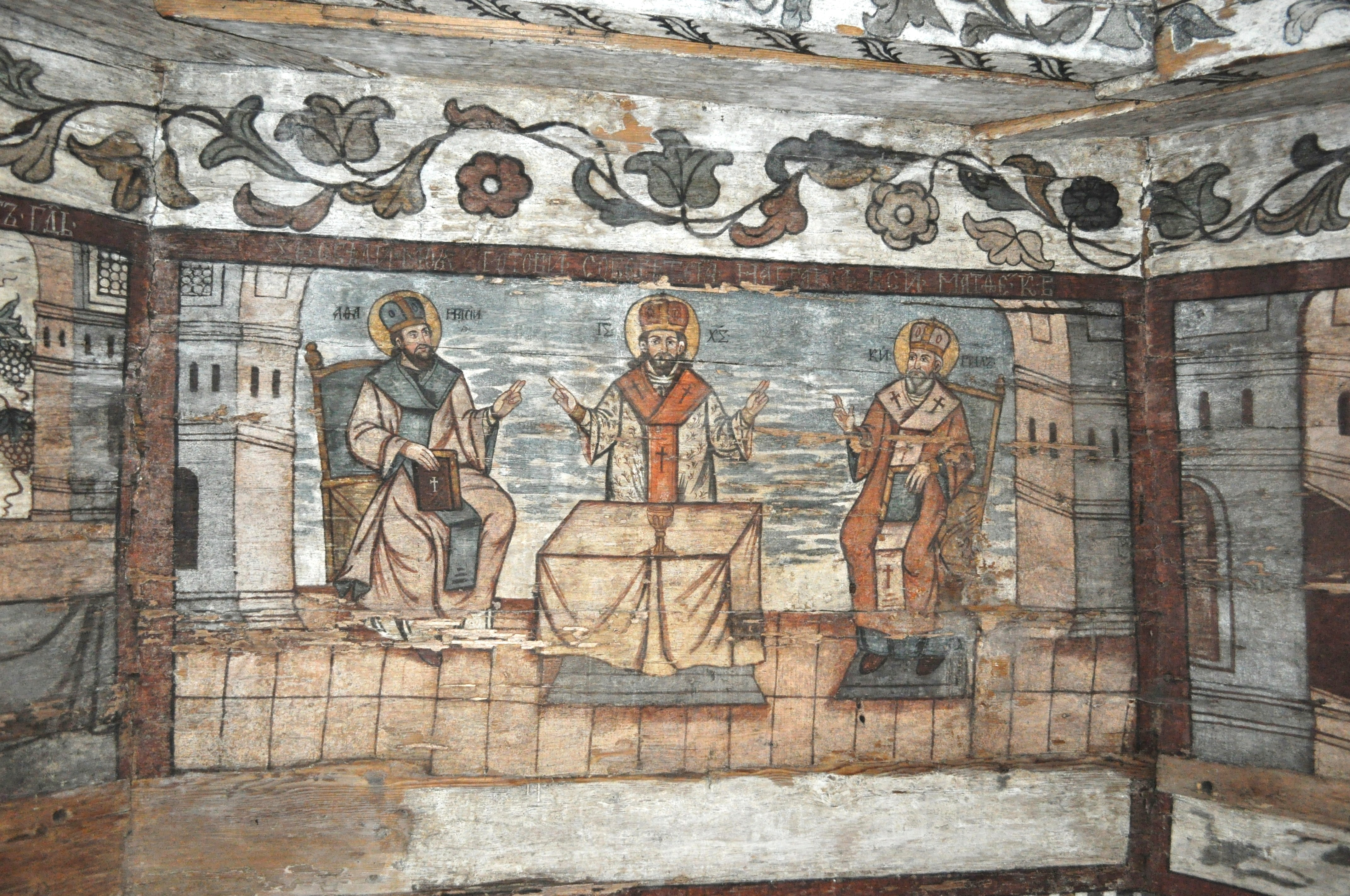 Biserica de lemn "Sfântul Nicolae", sat BOGDAN VODĂ